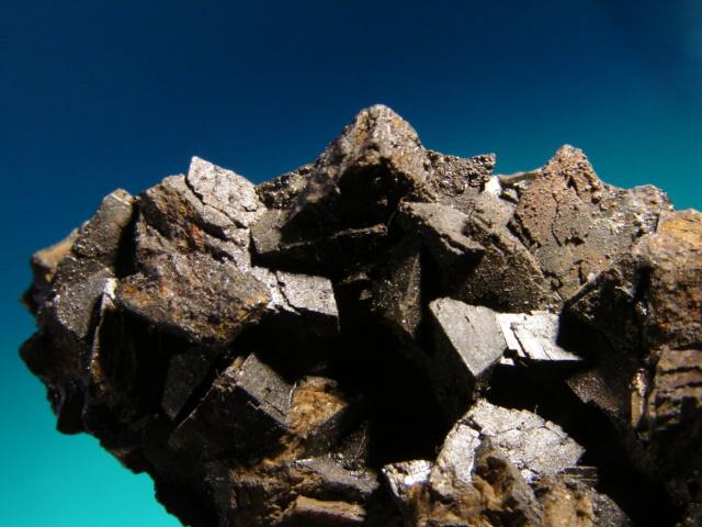 Syderyt, pochodzenie Polska, Sudety; autor zdjęcia Piotr Gut